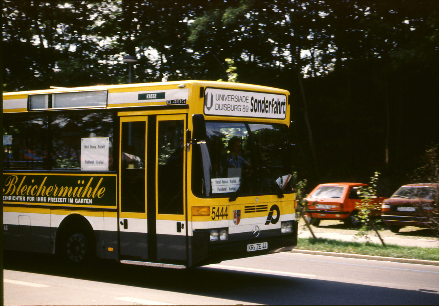 Bus-Sonderfahrt während der Universiade Duisburg, 1989.